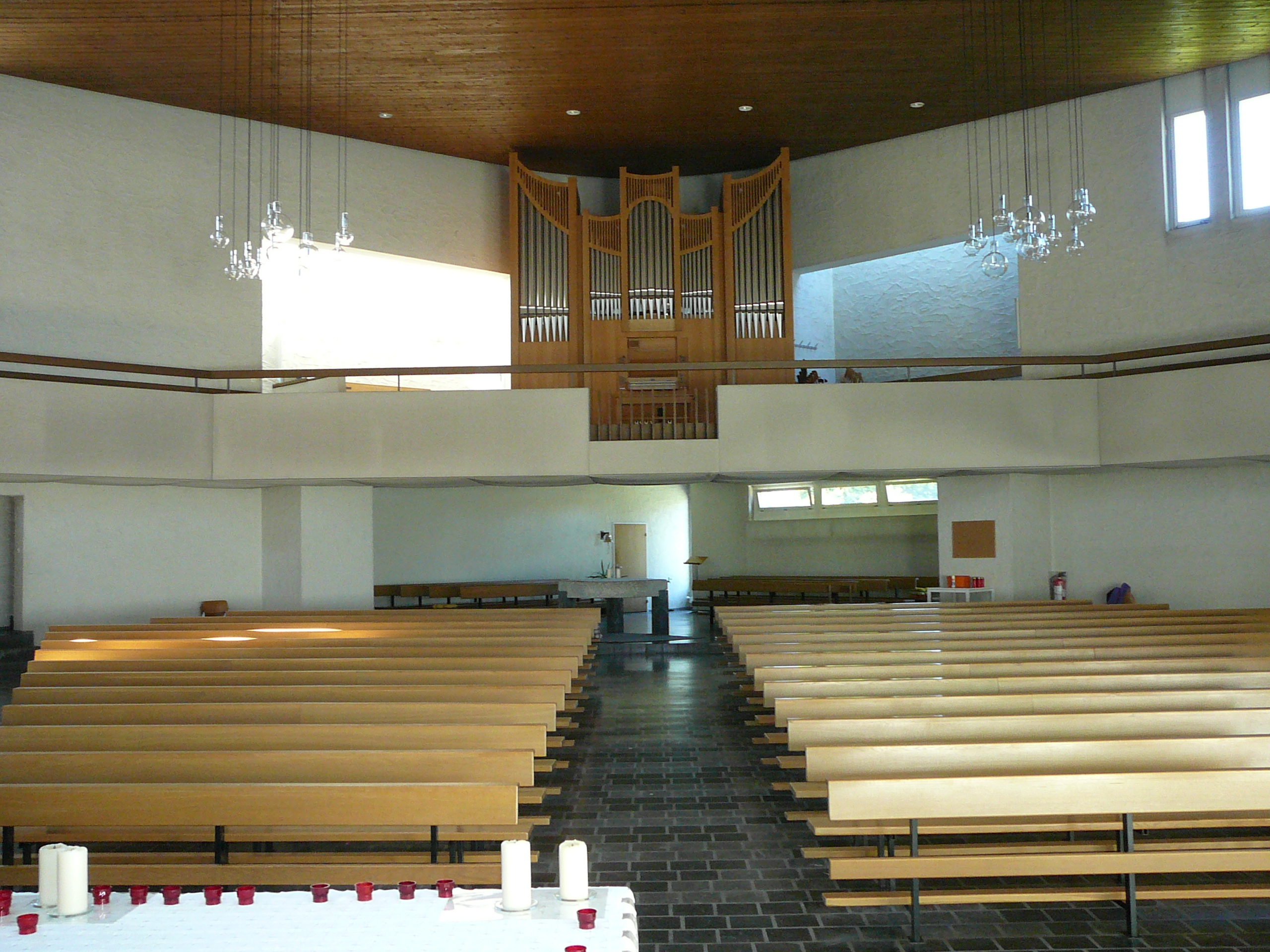 Römisch-katholische Pfarrkirche St. Petrus Rümlang, Innenraum